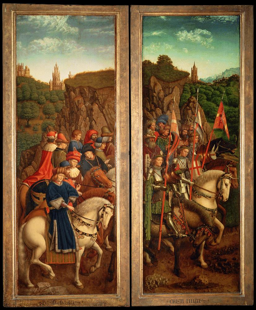 retable de l'Agneau mystique